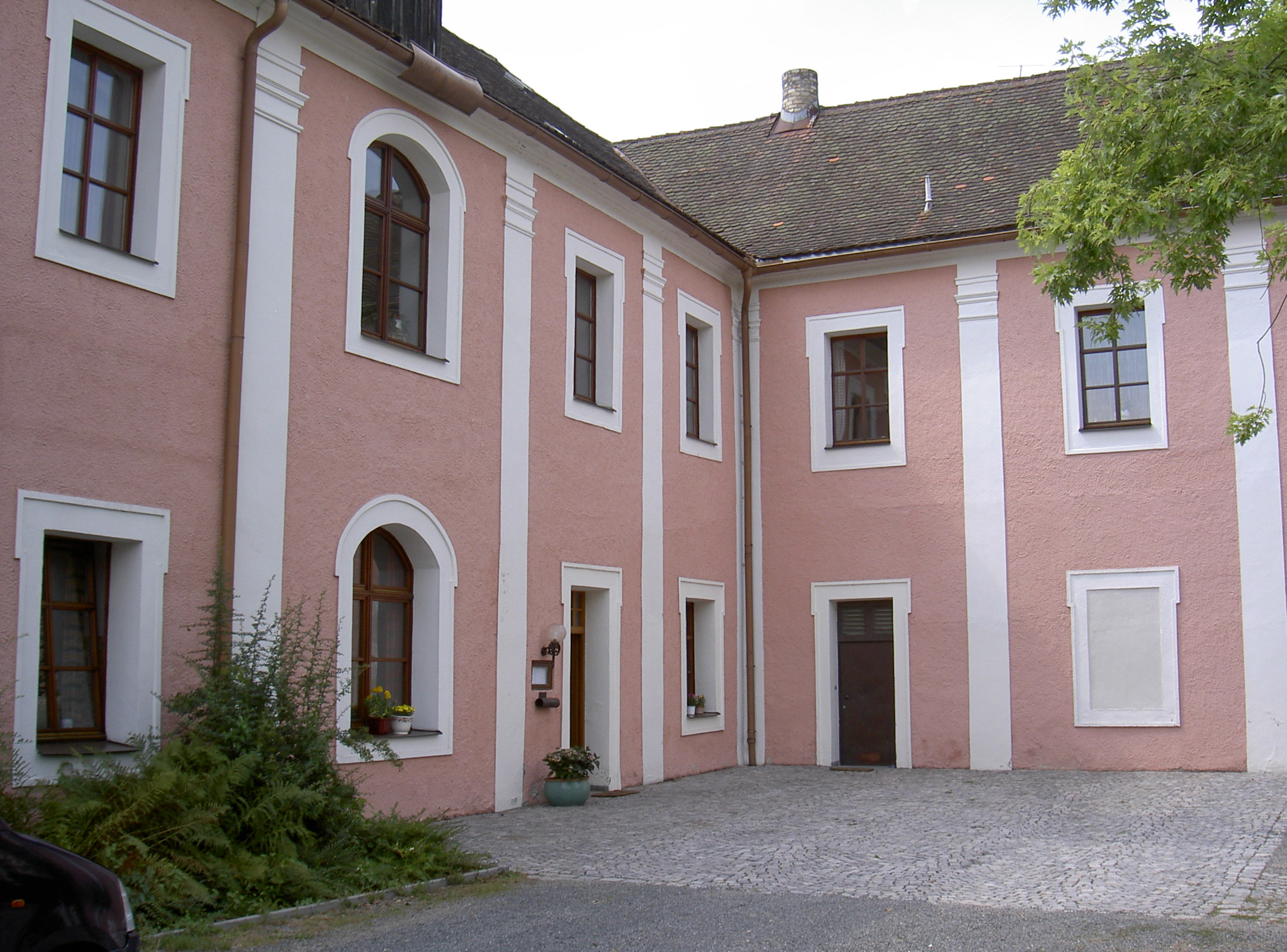 Kröblitz, ehemaliges Barockschloss, jetzt Brauerei und Gastwirtschaft, Innenhof